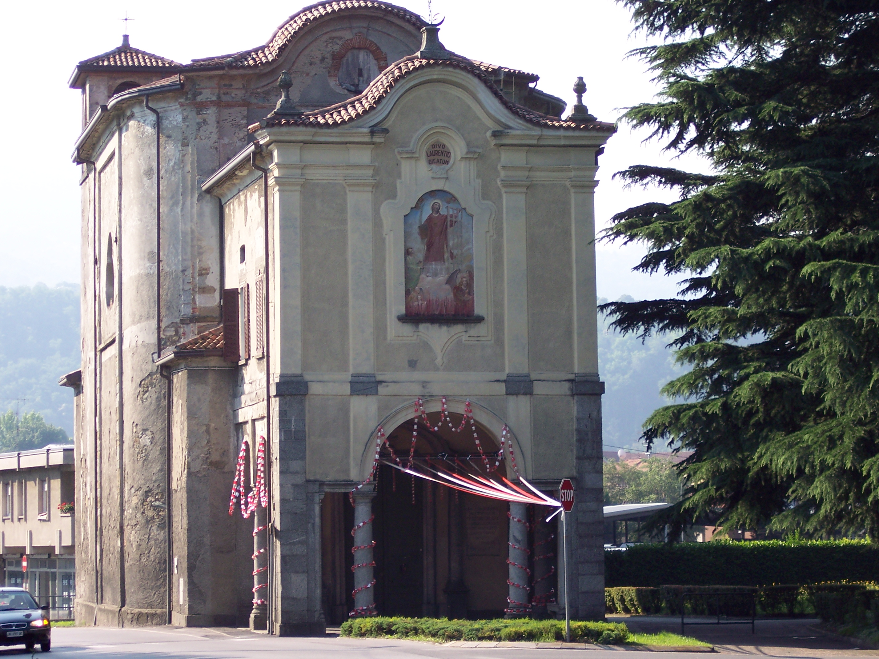 Chiesa barocca dedicata a San Lorenzo